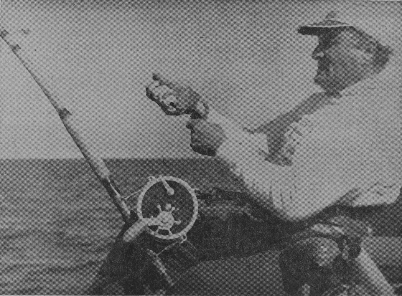 Arkitekten Mogens Mogensen vid tonfisk fiske i Öresund